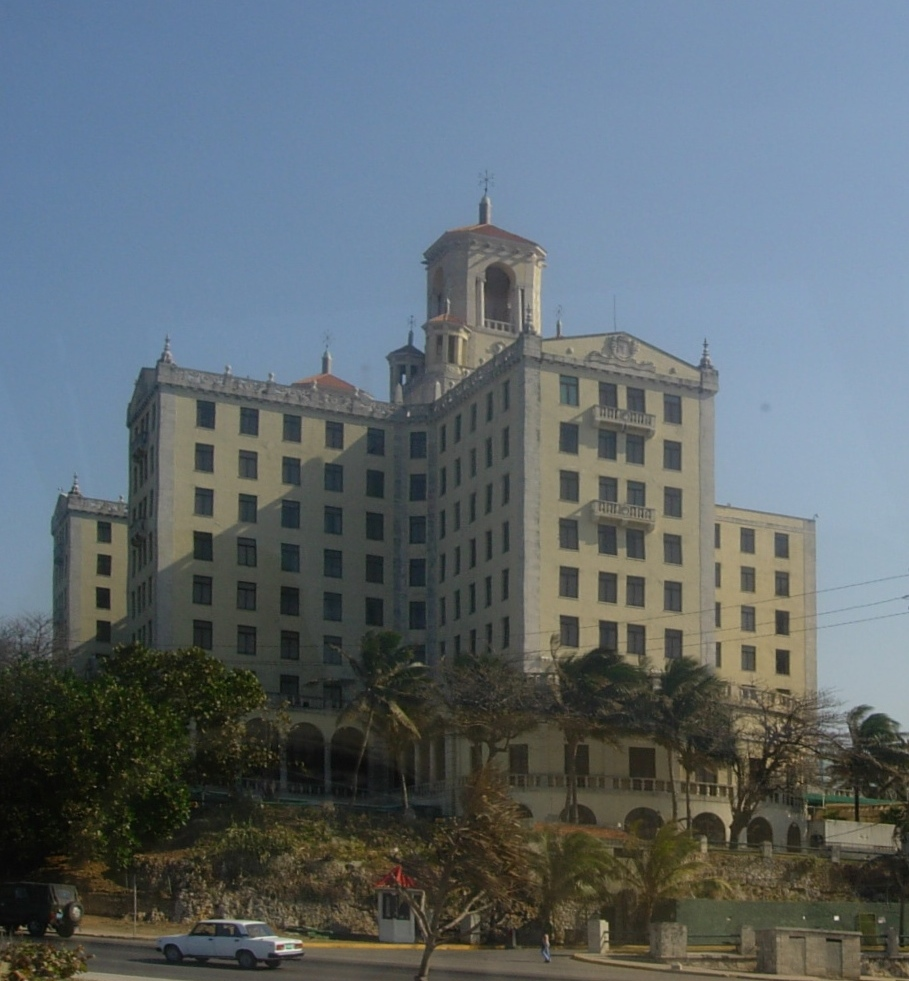 Ancienne « maison » de Lucky Luciano à Cuba.